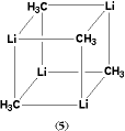 framemetüülliitium